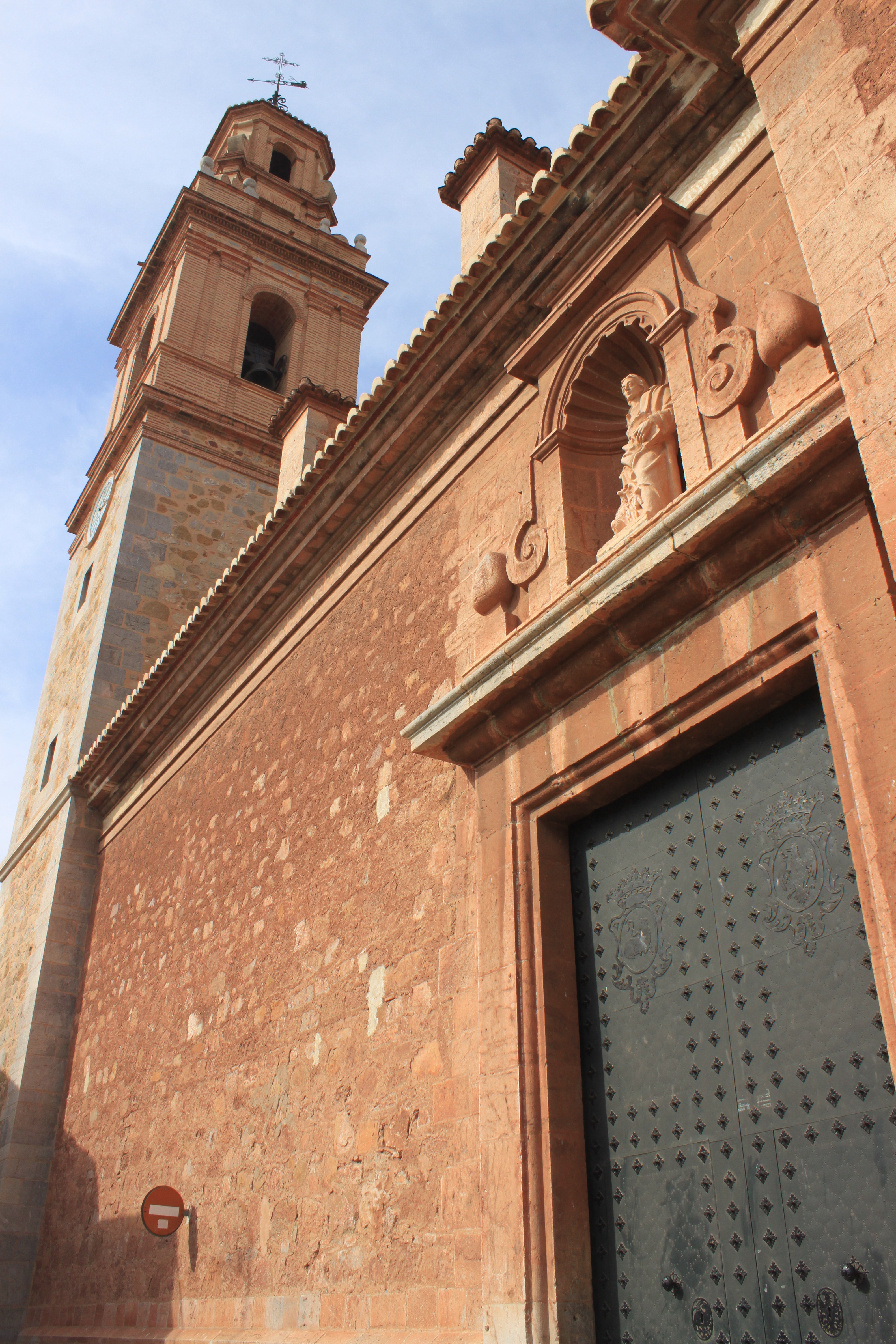 Iglesia Parroquial de los Santos Juanes de la localidad de Almenara, provincia de Castellón, Comunidad Valenciana.